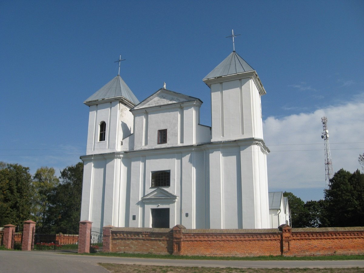 Сігневічы. Касцёл Святой Дзевы Марыі